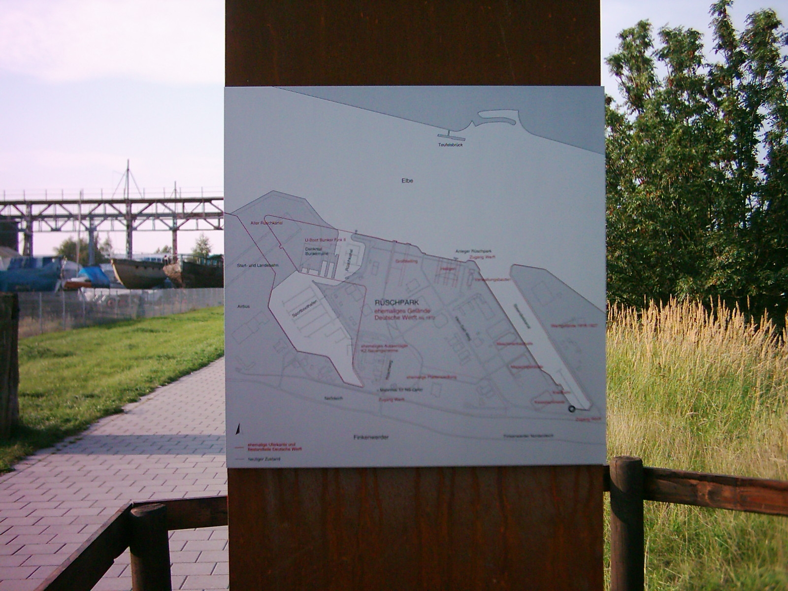 Hamburg-Finkenwerder: Übersichtstafel Rüschpark, ehemaliges Gelände der Deutschen Werft.